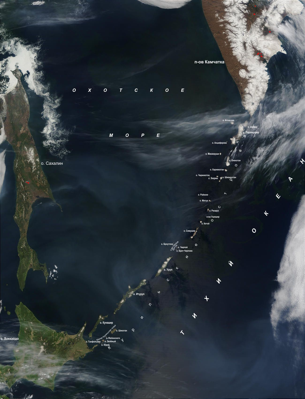 Фотокарта Курильских островов на основе космического снимка НАСА